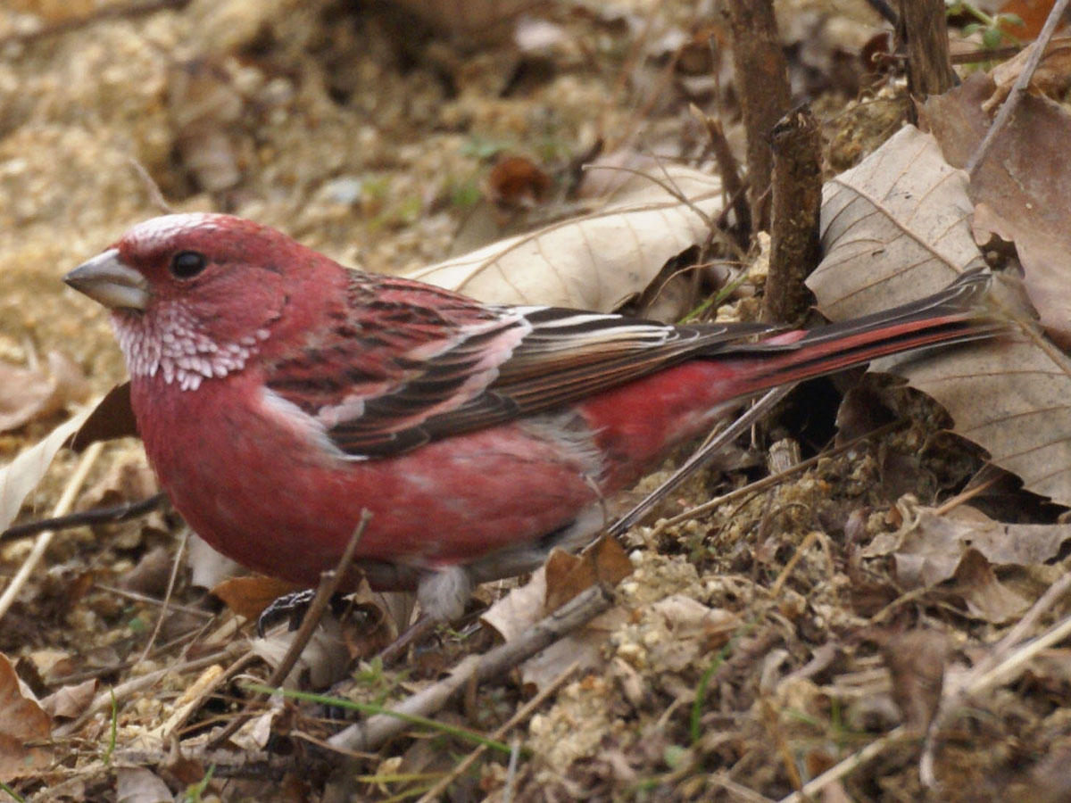 オオマシコ。♂。神戸市内にて。